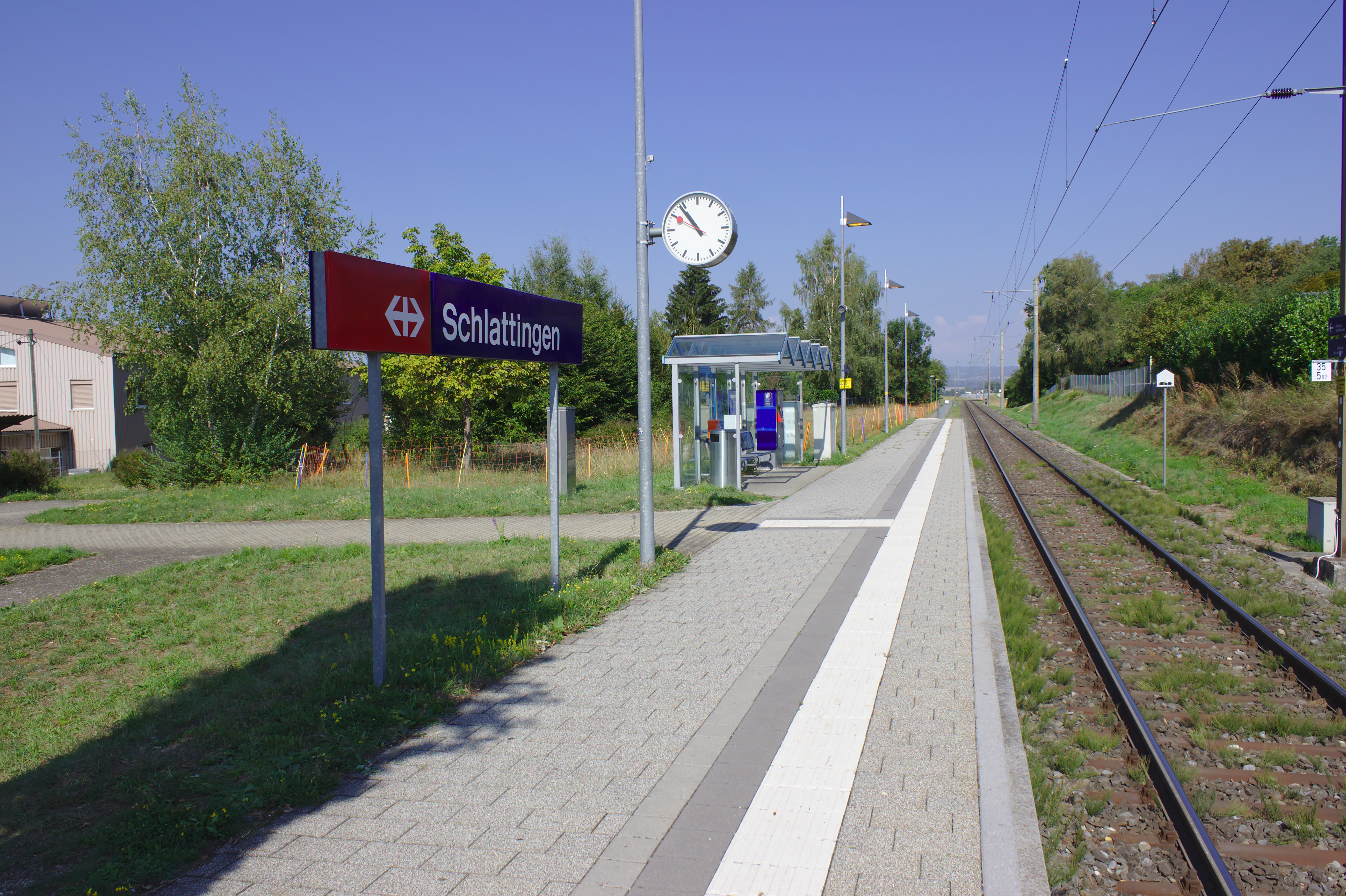 Bahnhof Schlattingen, Thurgau, Schweiz